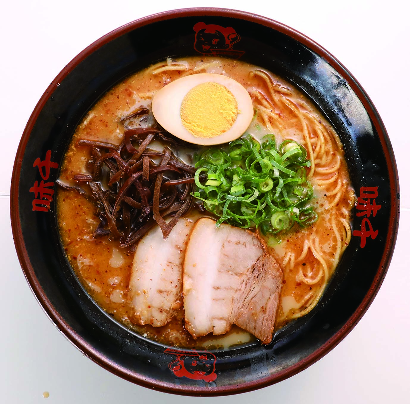 味千ラーメンチェーン本部重光産業株式会社提供の味千ラーメン画像